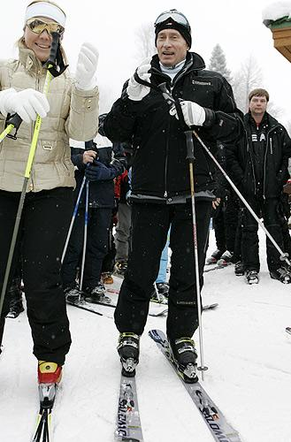 Владимир Путин и Светлана Гладышева на открытии горнолыжного курорта ГТЦ Газпром в Красной Поляне